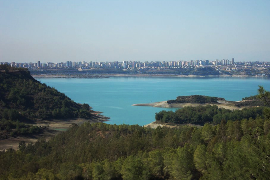 Ormanlık kesim ve göl üzerinden Çukurova ilçesi.